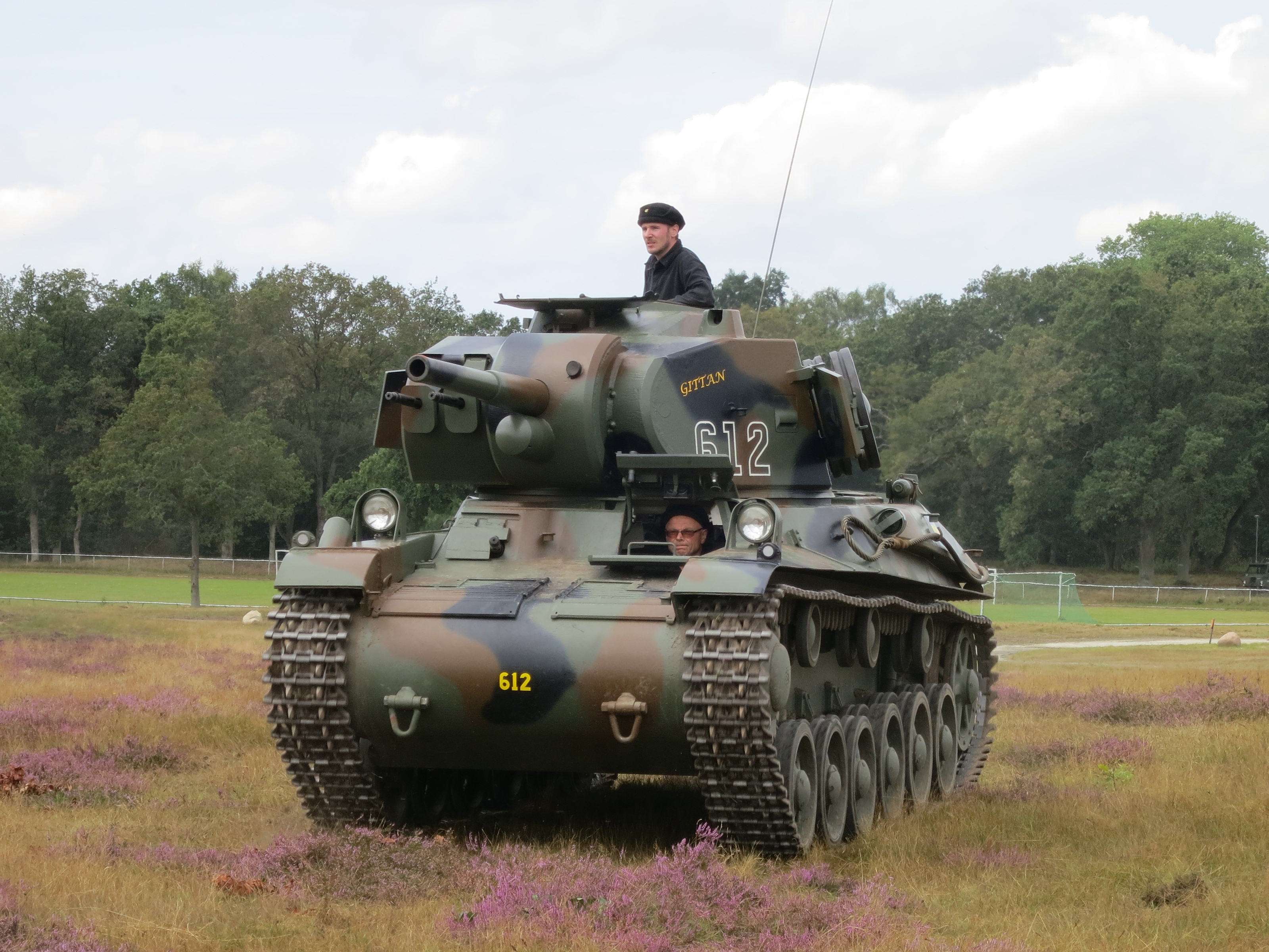 Stridsvagn modell 42 vid P7 Regementets dag 2012